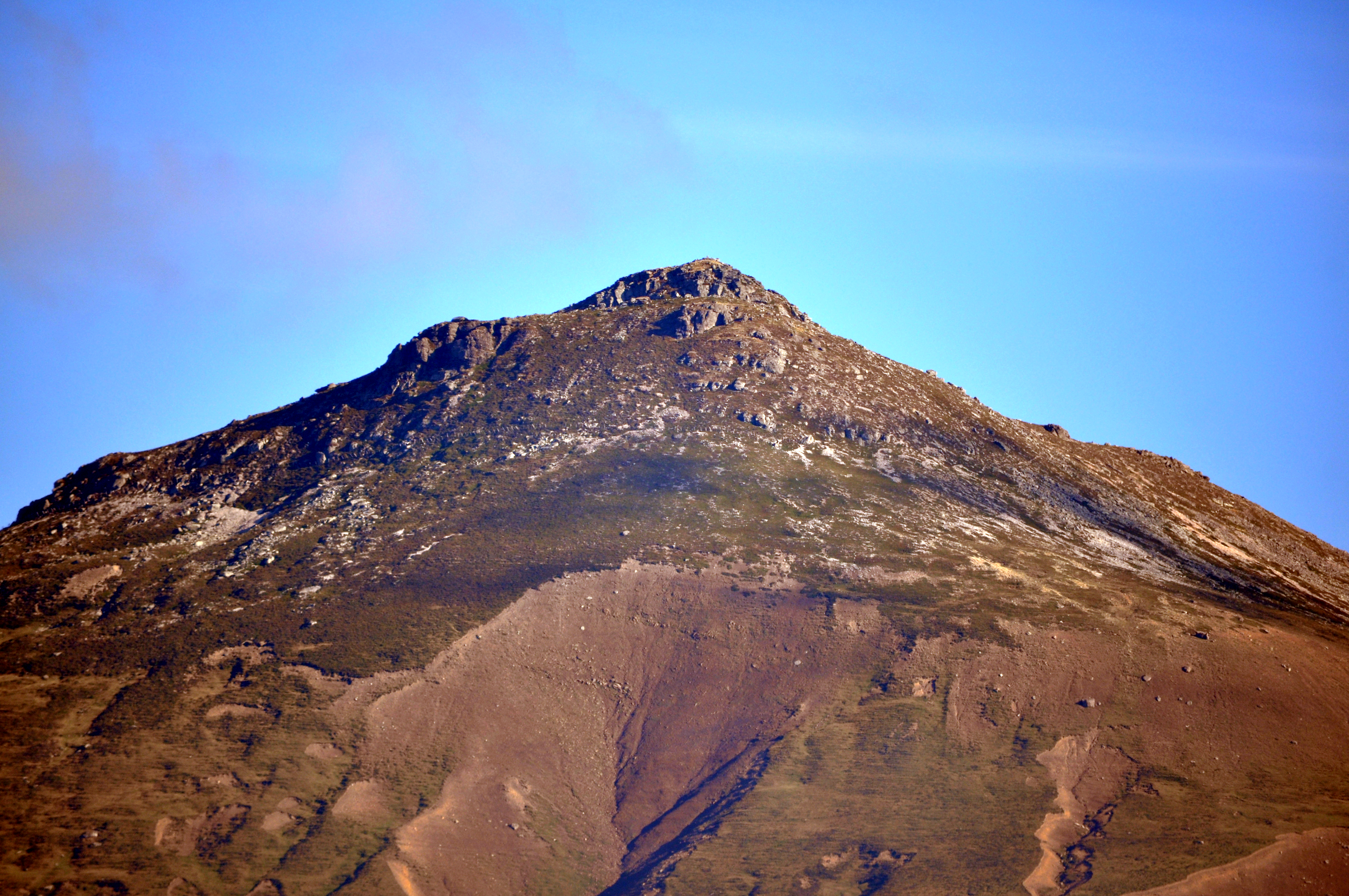 Cueto cordel (206.3 msnm) visto desde Cuquillu.